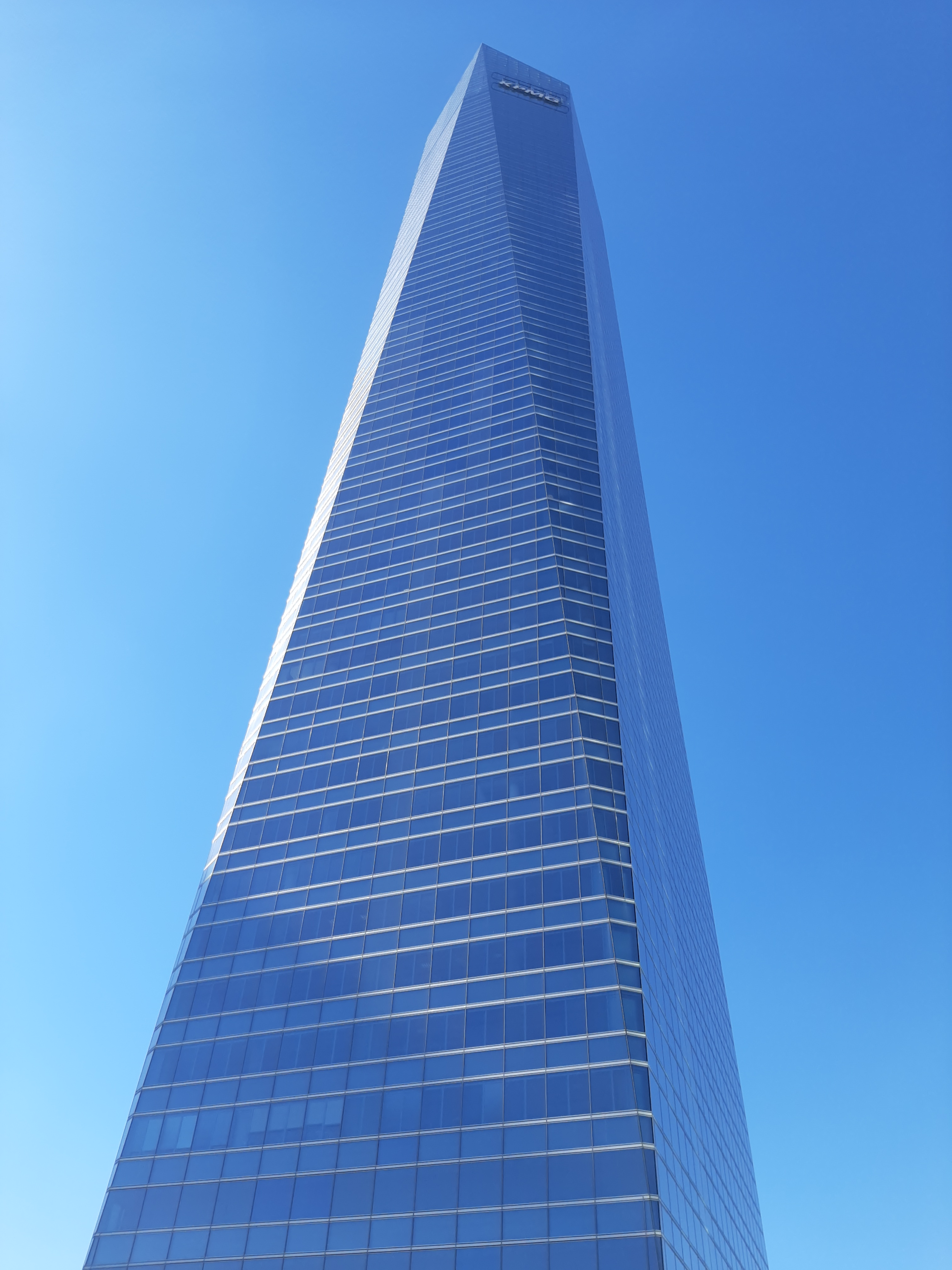 Torre KPMG (Madrid)